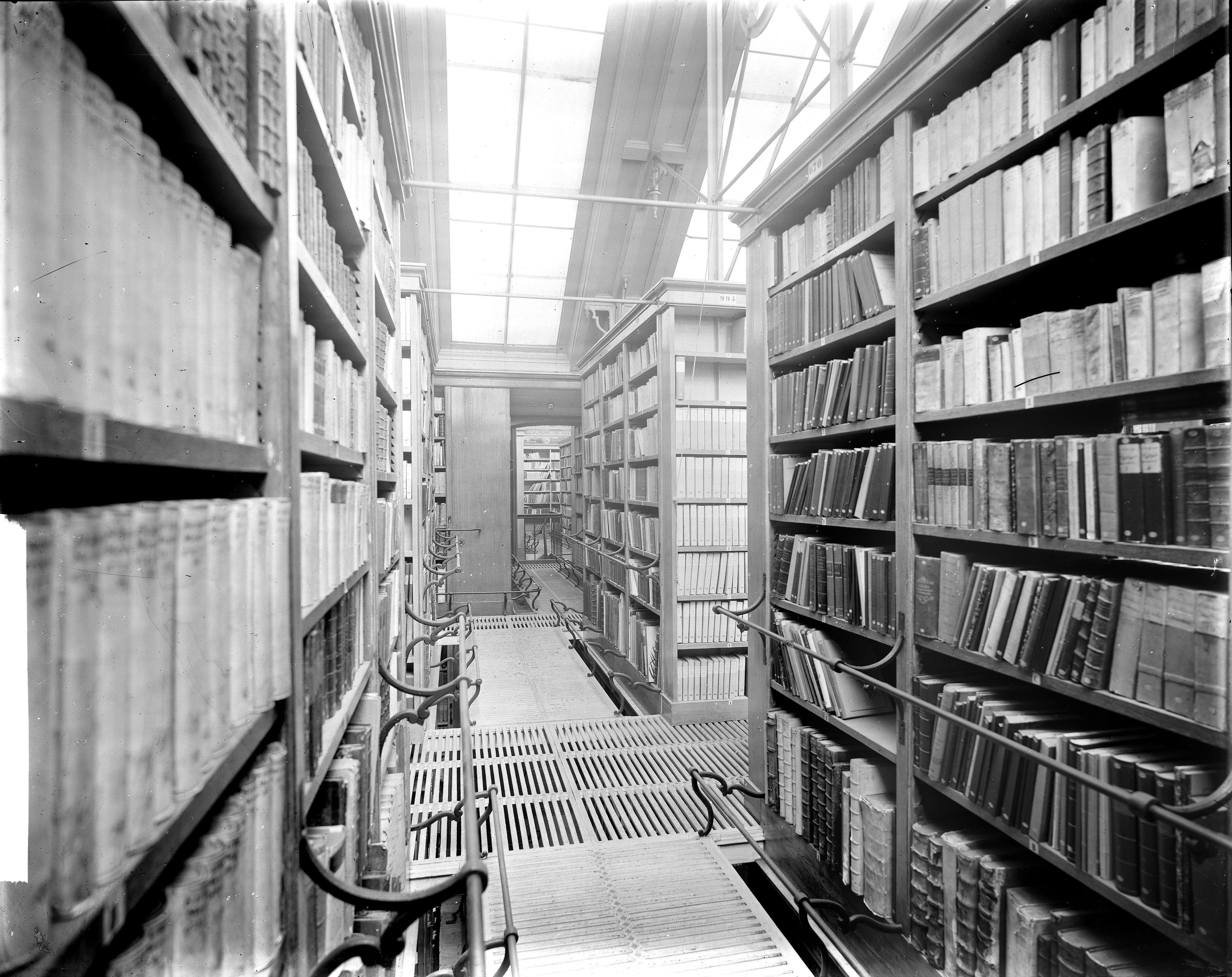 Gezicht op het depot van de universiteitsbibliotheek aan het Rapenburg in Leiden. Met boekenkasten onder een schuin glazen dak.